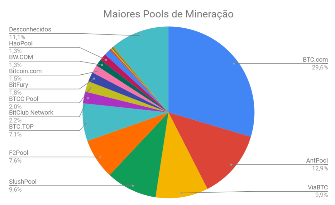 Gráfico Pizza mostrando as principais Pools de Mineração Existente e sua parcela no mercado.